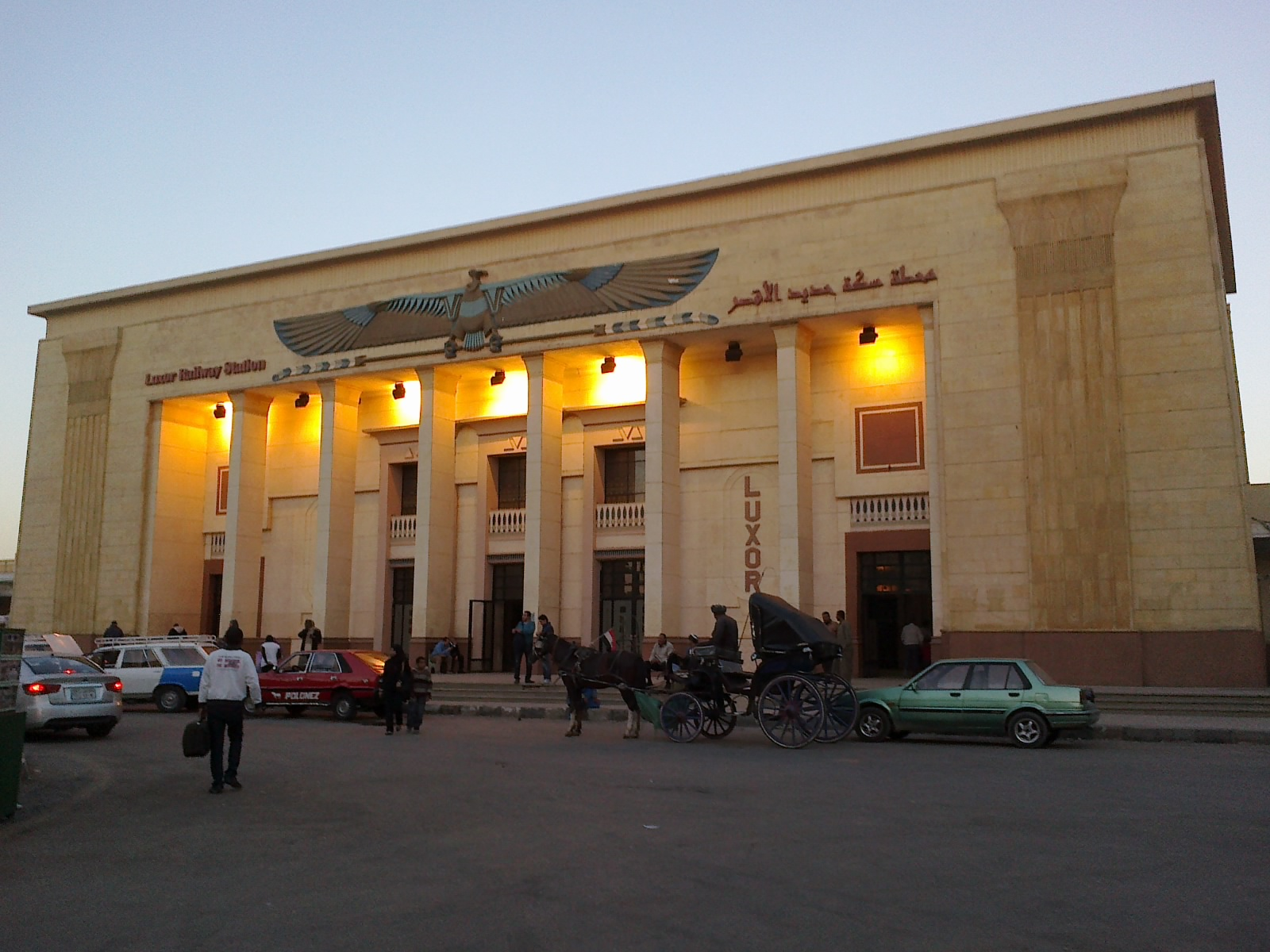 Egypte Louxor Gare 16032012